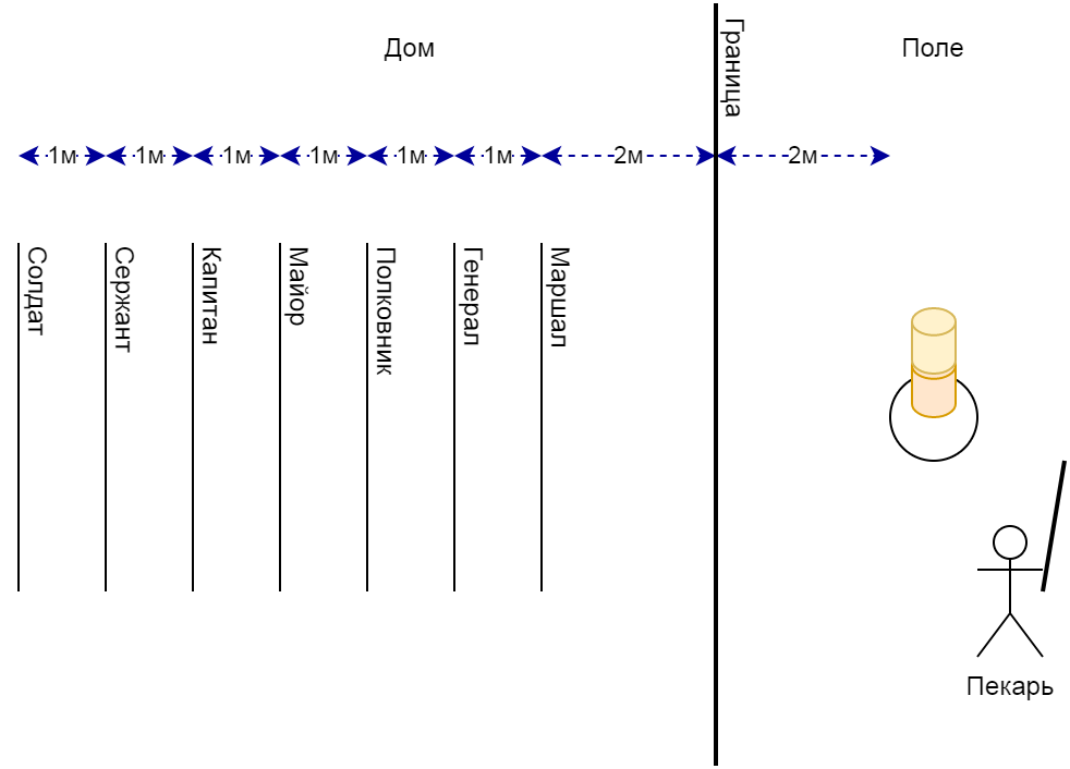 Схема площадки для игры в "Пекаря"